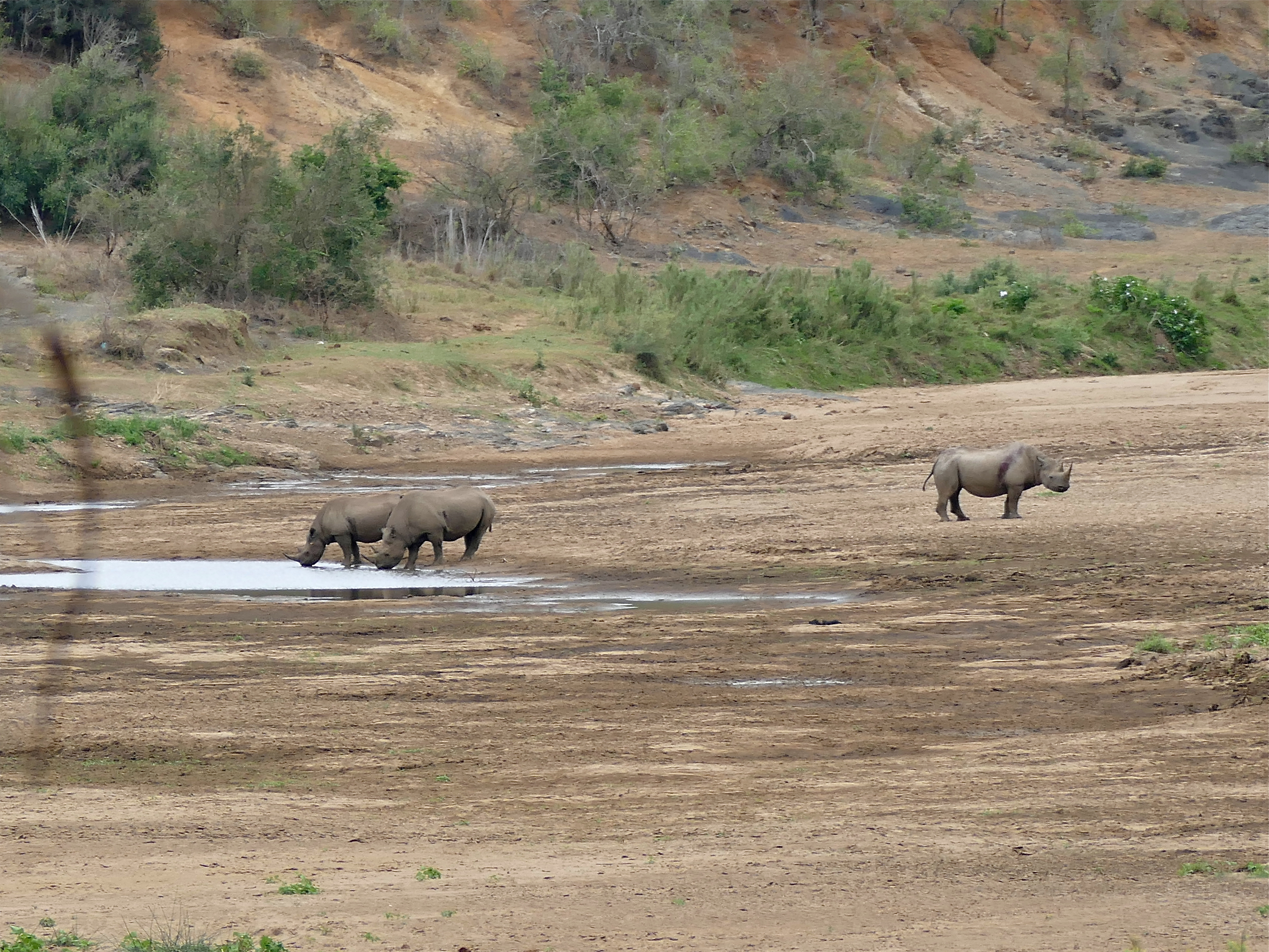 Sontuli Loop, iMfolozi Game Reserve, Hluhluwe-iMfolozi Park, Kwazulu-Natal, SOUTH AFRICA